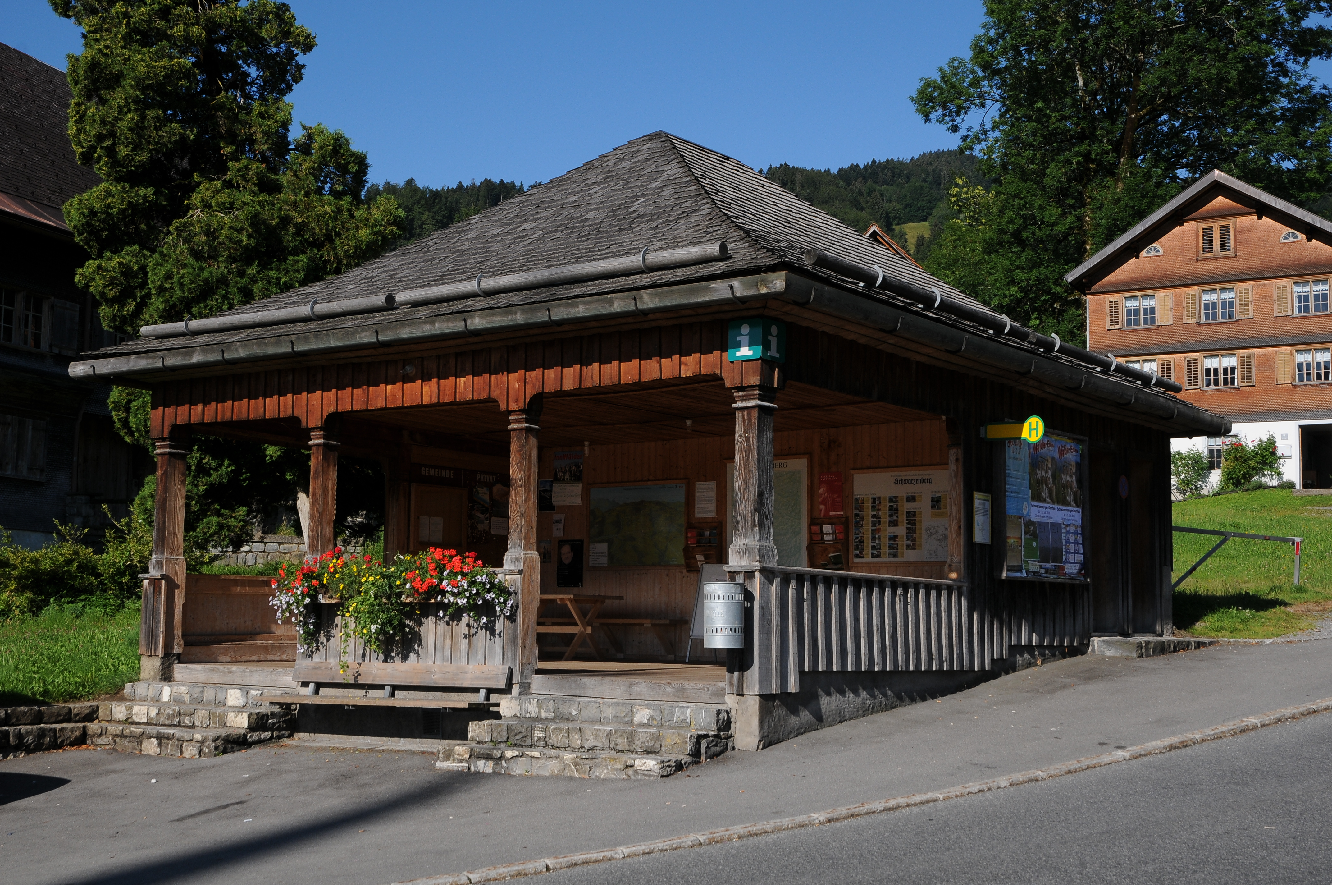 Tanzhaus / Tanzlaube in Hof am Schwarzenberg. Das Objekt steht unter Denkmalschutz.